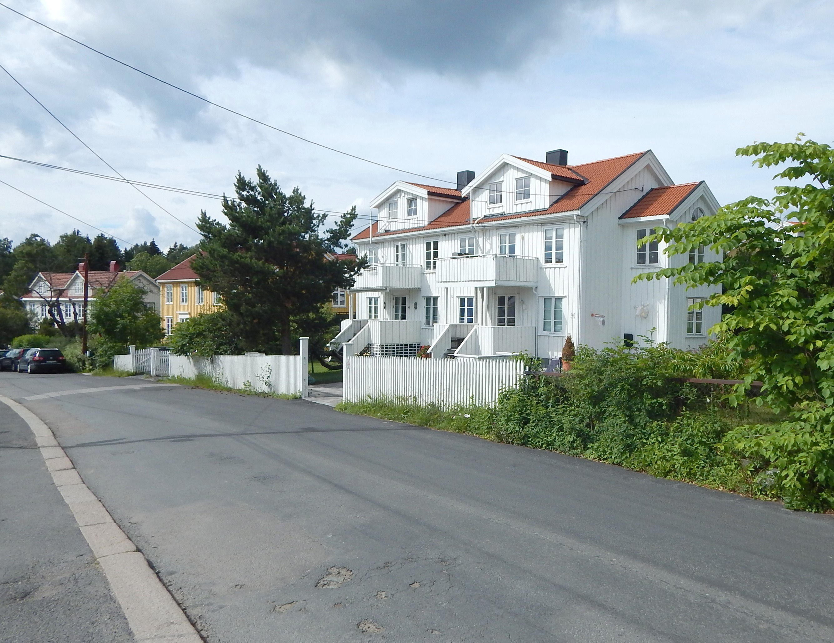 Erlandstuveien